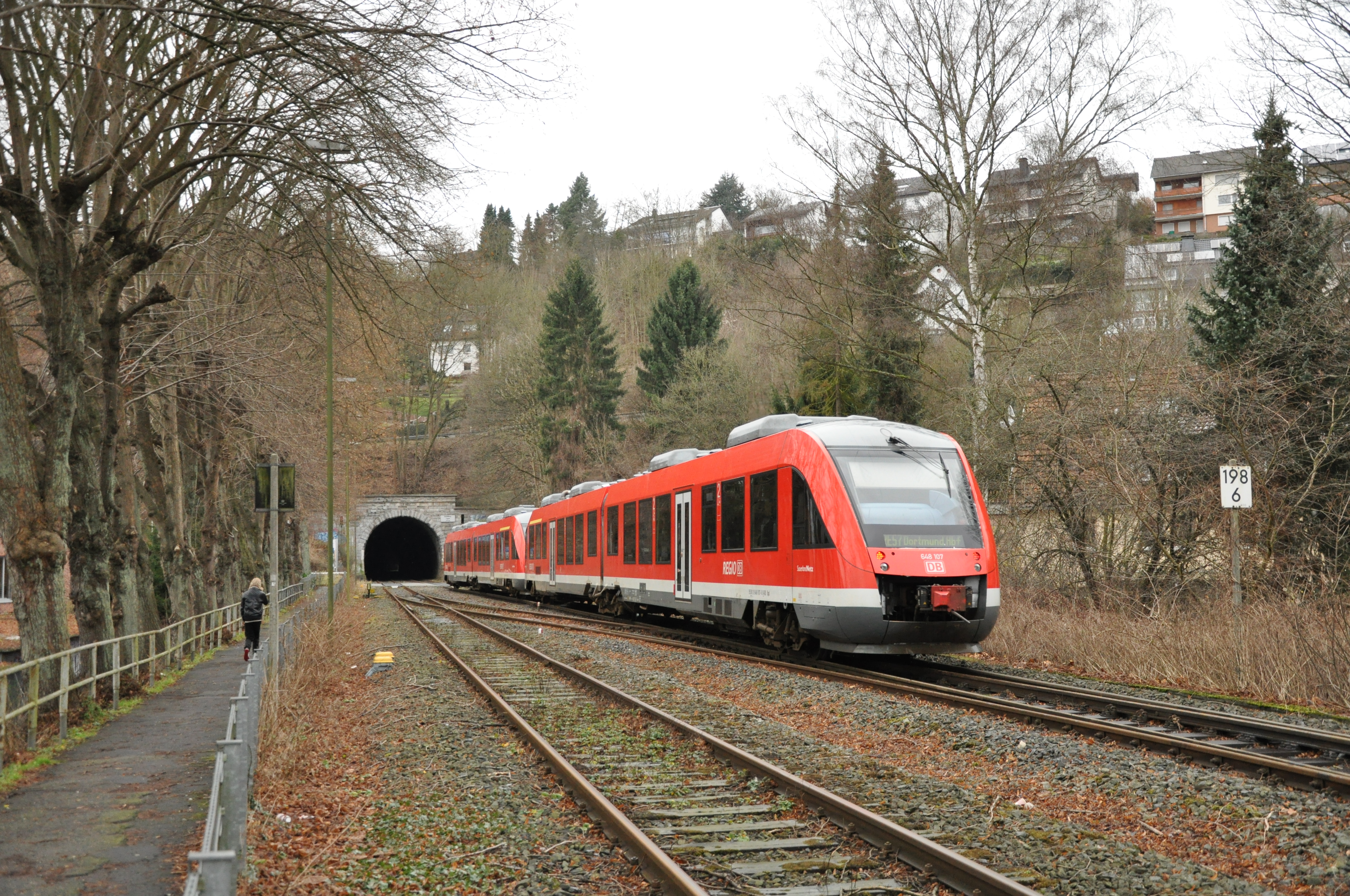 Doppeltraktion Alstom Coradia Lint verlässt Arnsberg in Richtung Dortmund.